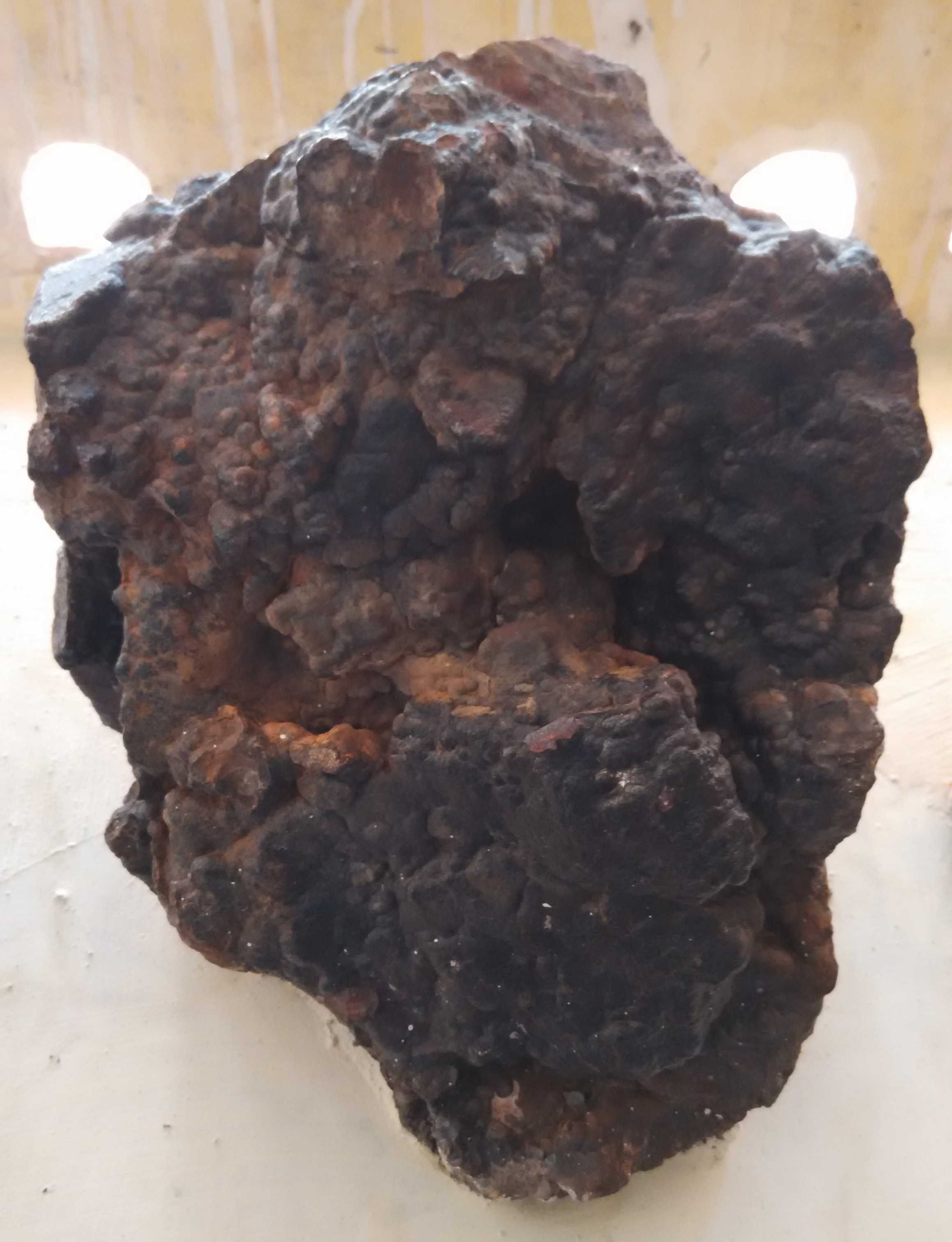 பெரியார் பல்கலைக் கழகத்தின் நிலத்தியல் துறையிலுள்ள காட்சிப்பொருள்.